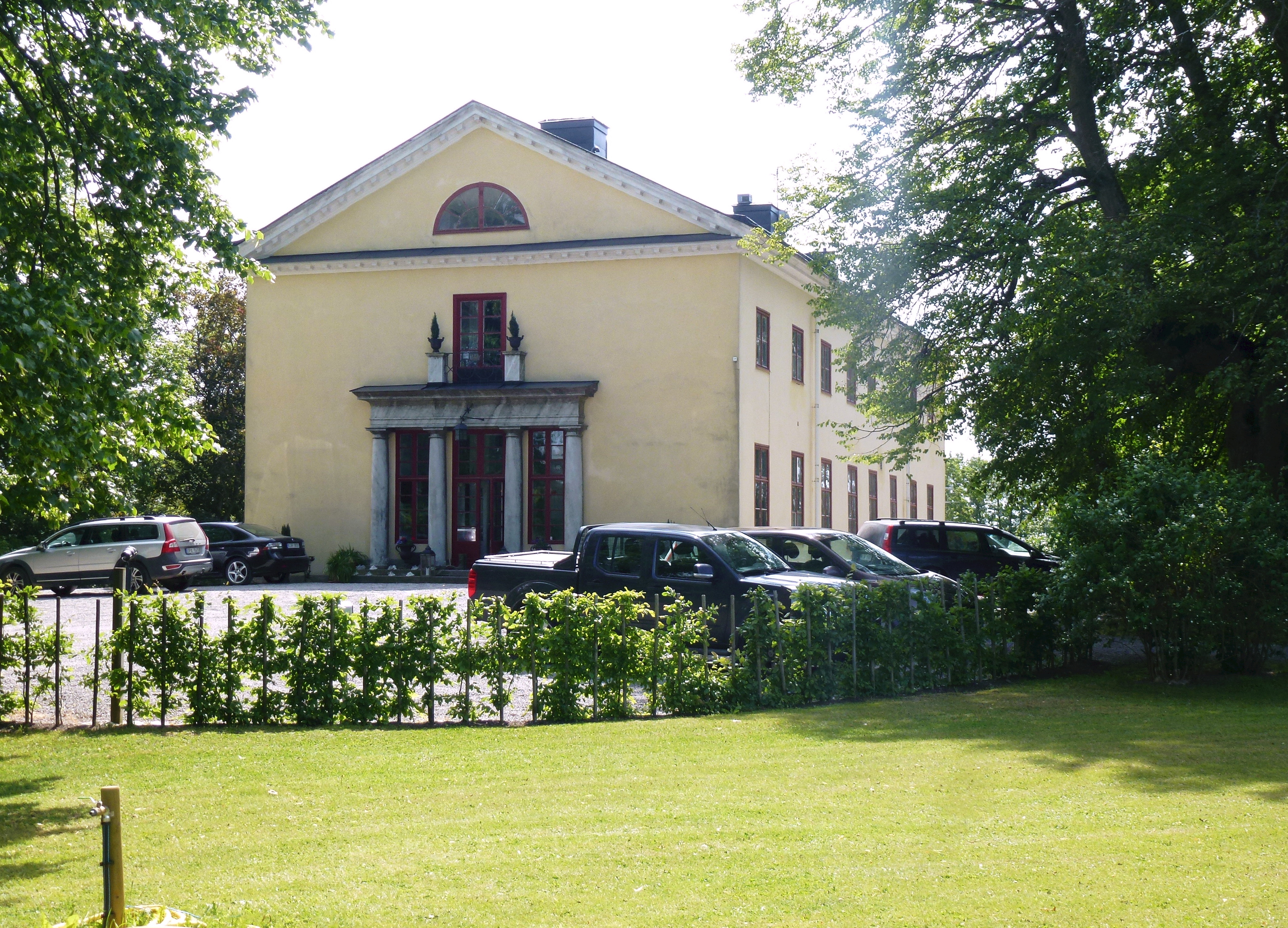 Almarestäkets herrgård